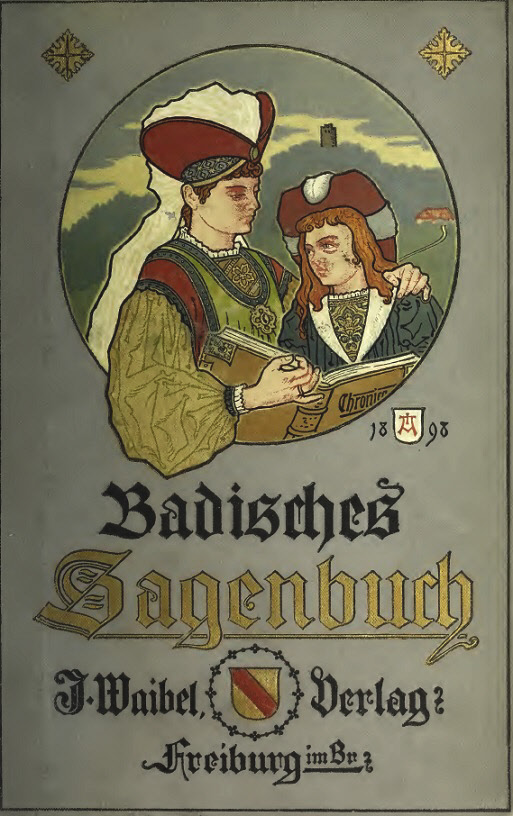 Cover von „Badisches Sagen-Buch“ - „Sagen des Bodensee's, des oberen Rheinthals und der Waldstädte“. Freiburg 1898 (auch für den zweiten Band "Sagen Freiburgs und des Breisgaus" verwendet